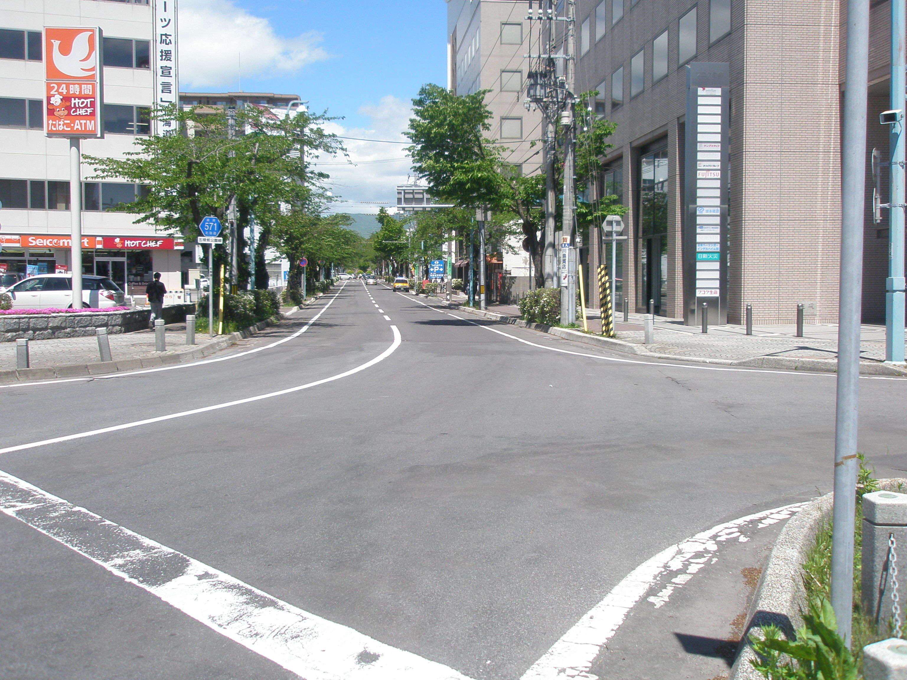 北海道道571号五稜郭公園線・函館市五稜郭町32-4先交差点から五稜郭公園方向を見る